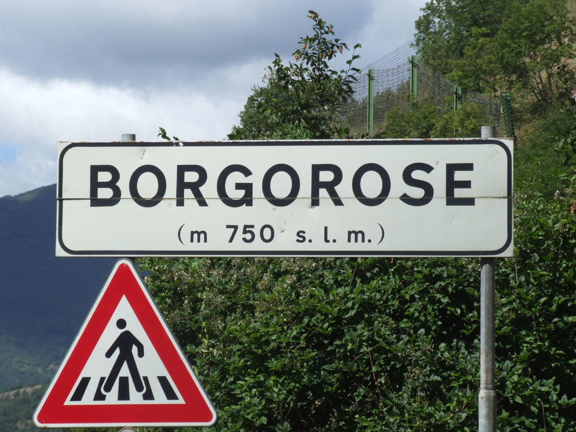 Segnale di Borgorose, Lazio, Italia